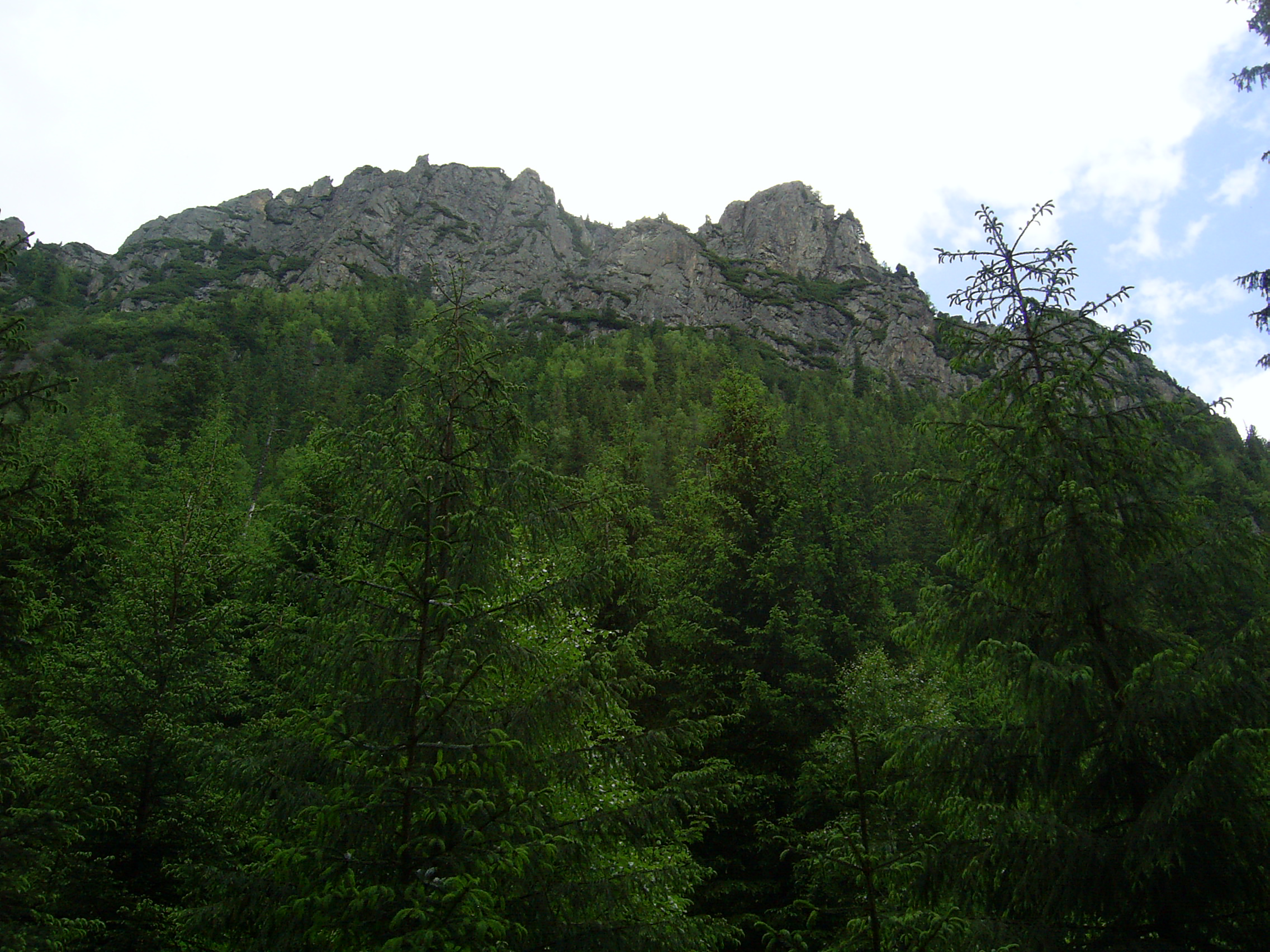 Niżnie Siodło, Turnia nad Szczotami, Roztocka Turniczka